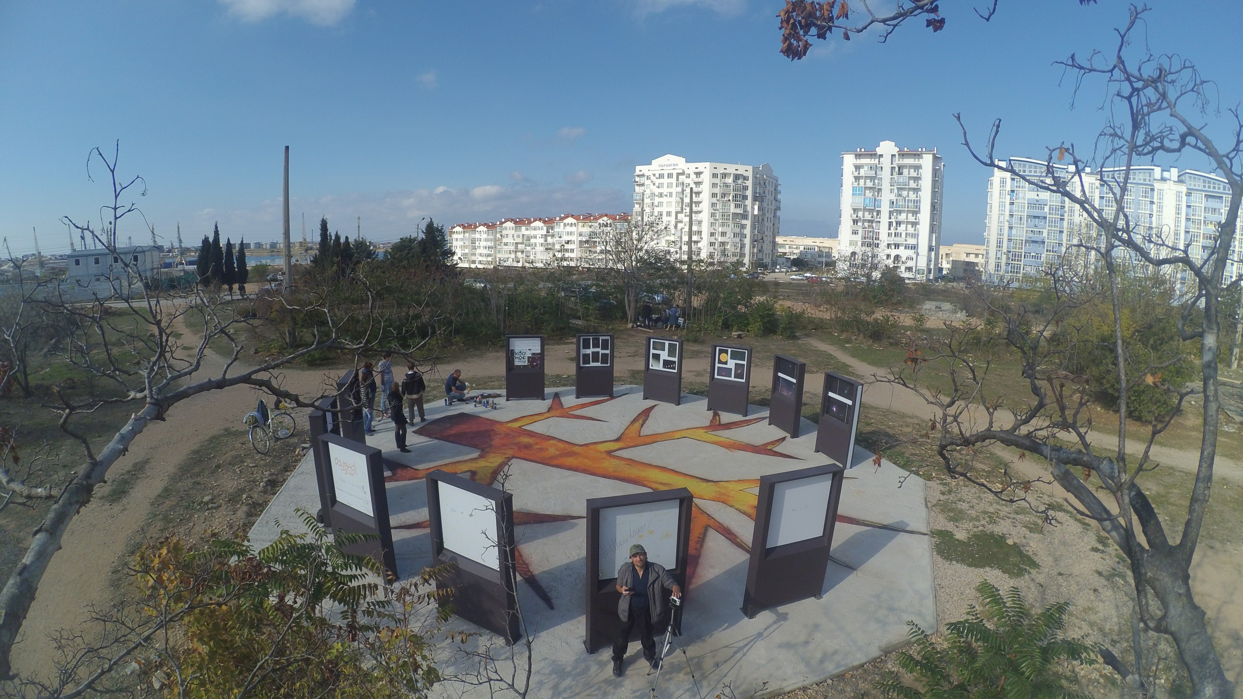 Уличная галерея "Парк", открыты в 2016 году.